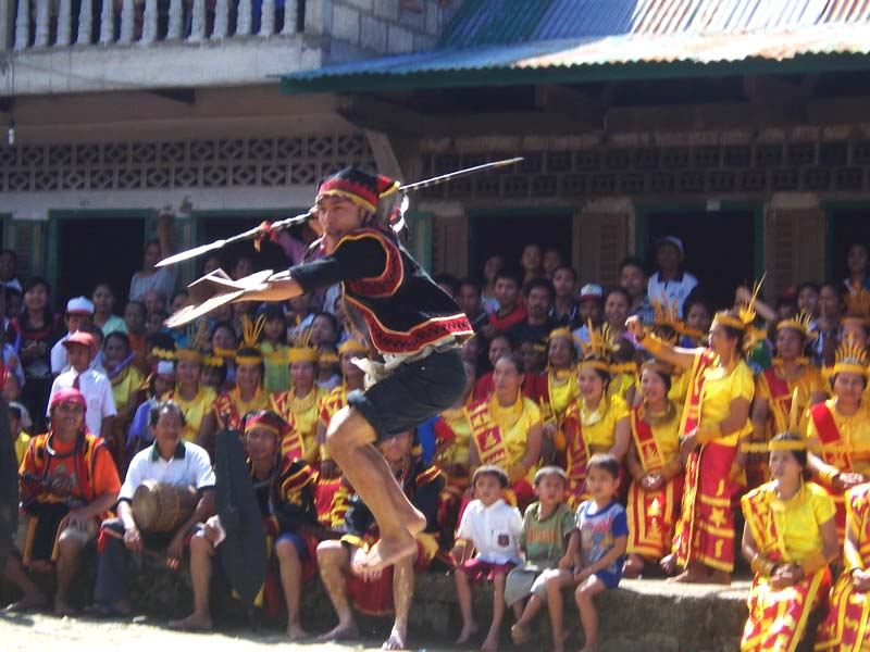 Tari Perang, Nias, Indonesia